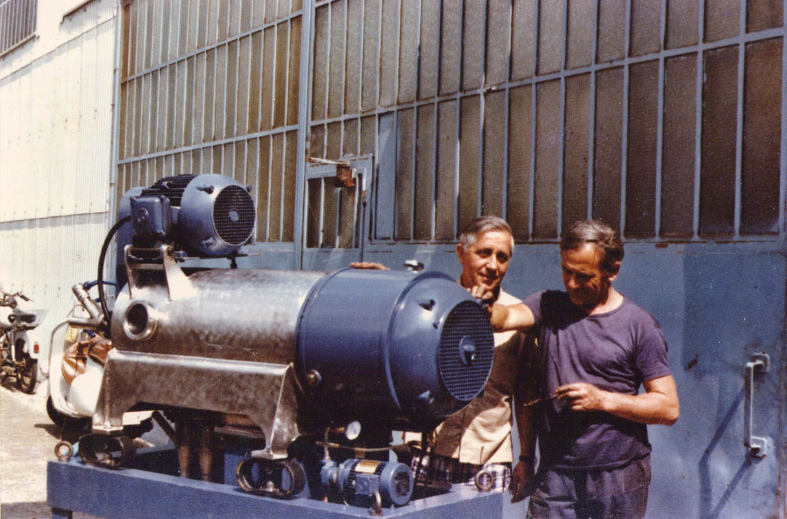 Ing. Mario De Martini nella sua officina in Celle Ligure, lavorando su uno de primi prototipi della sua macchina: decanter a 3 fasi.